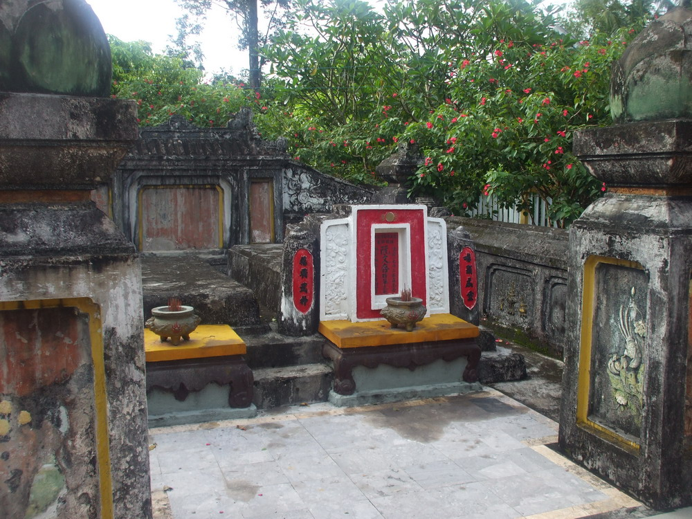 Mộ Nguyễn Văn Tồn (tức Thống Chế Điều Bát, bên phải ảnh) và vợ tại Trà Ôn (Vĩnh Long, Việt Nam)